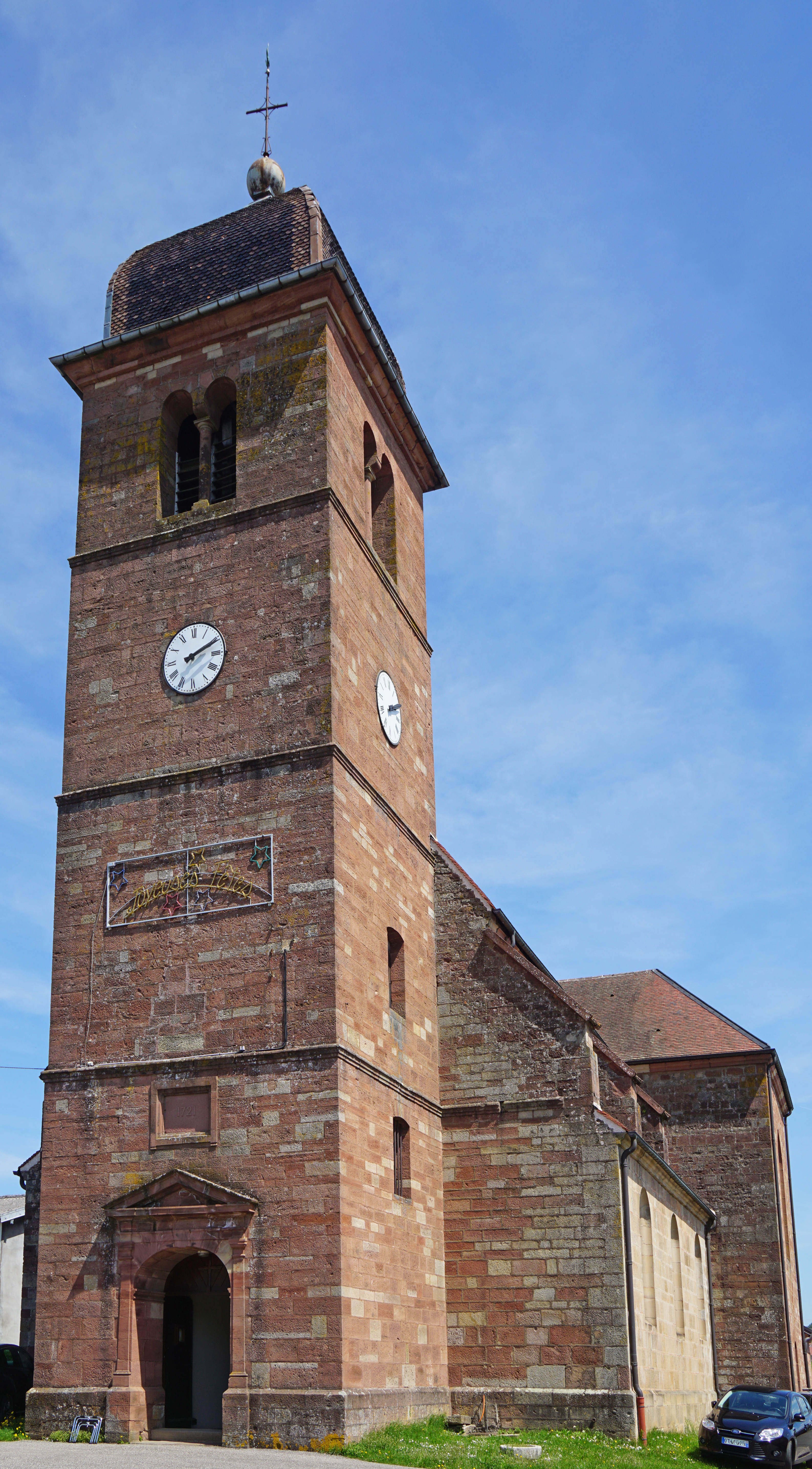 Église de Granges-la-Ville.